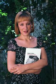 Angela Vallvey